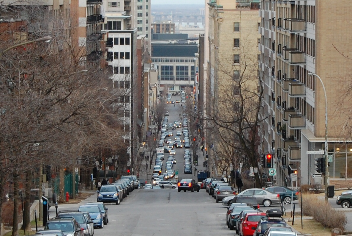 Rue Drummond, Montréal ( direction sud )